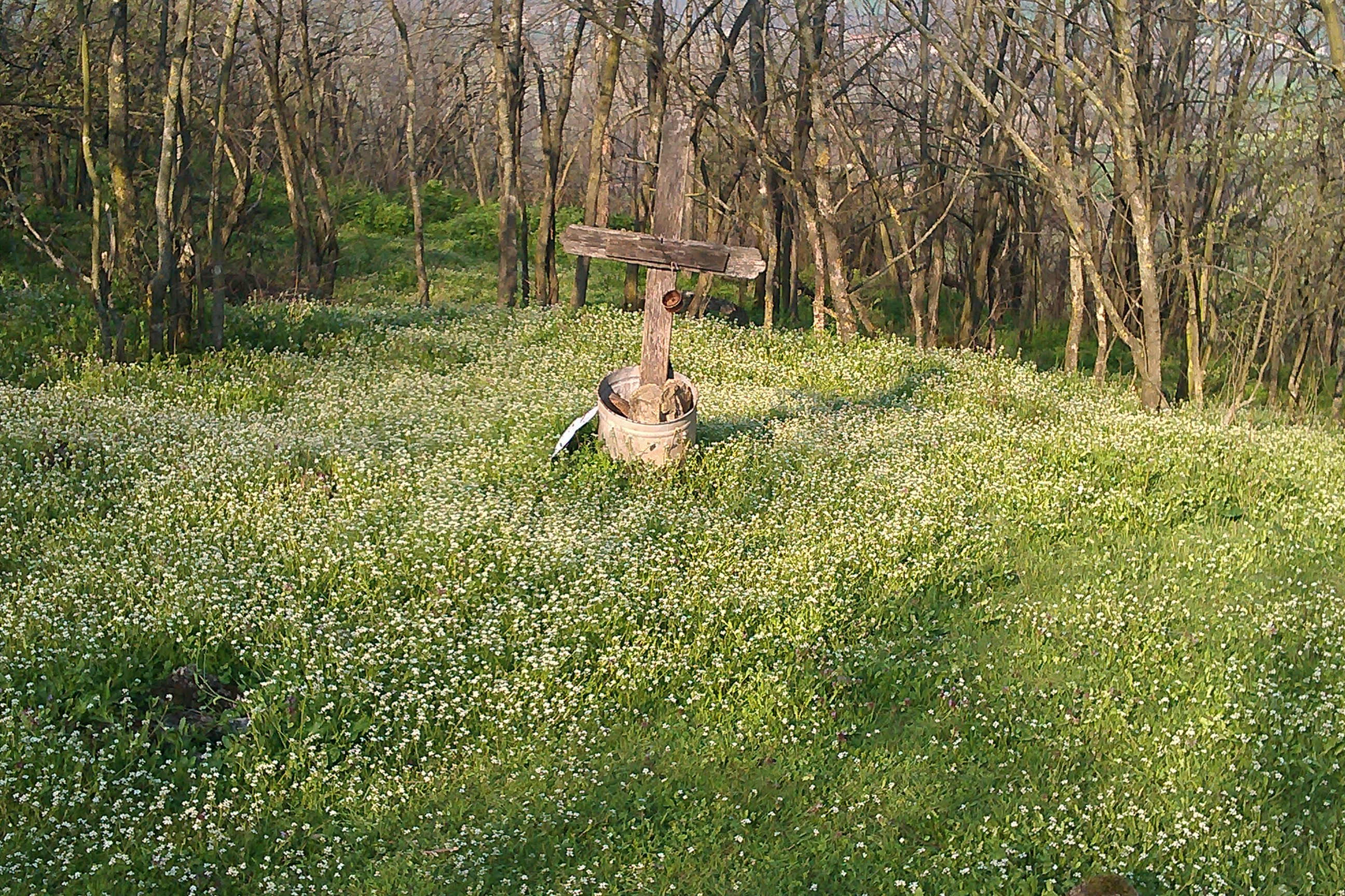 Srpski (latinica): Mesto gde se nekada nalazila crkva iz V veka